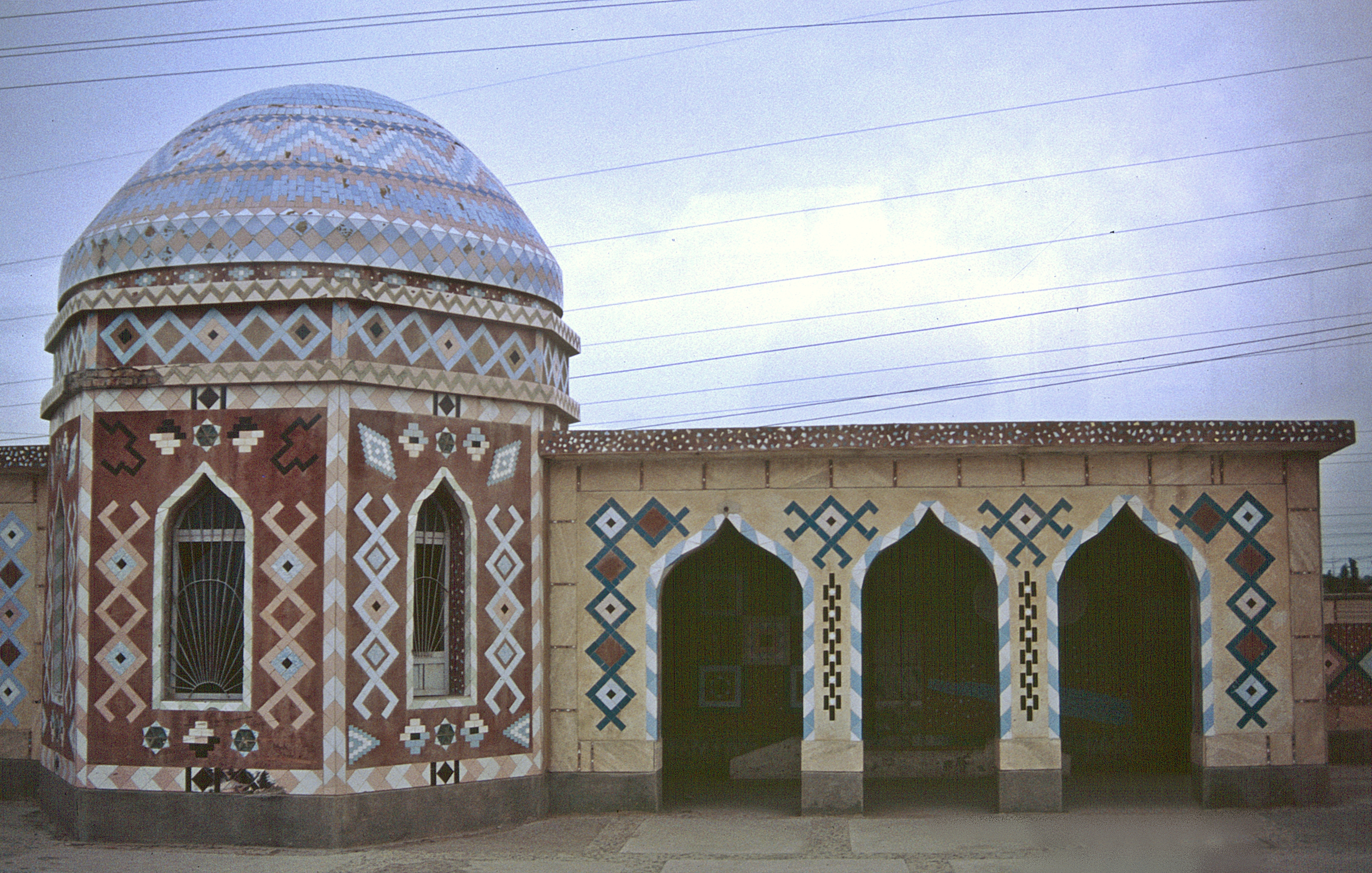 Mary, Turkmenistan: Bushaltestelle